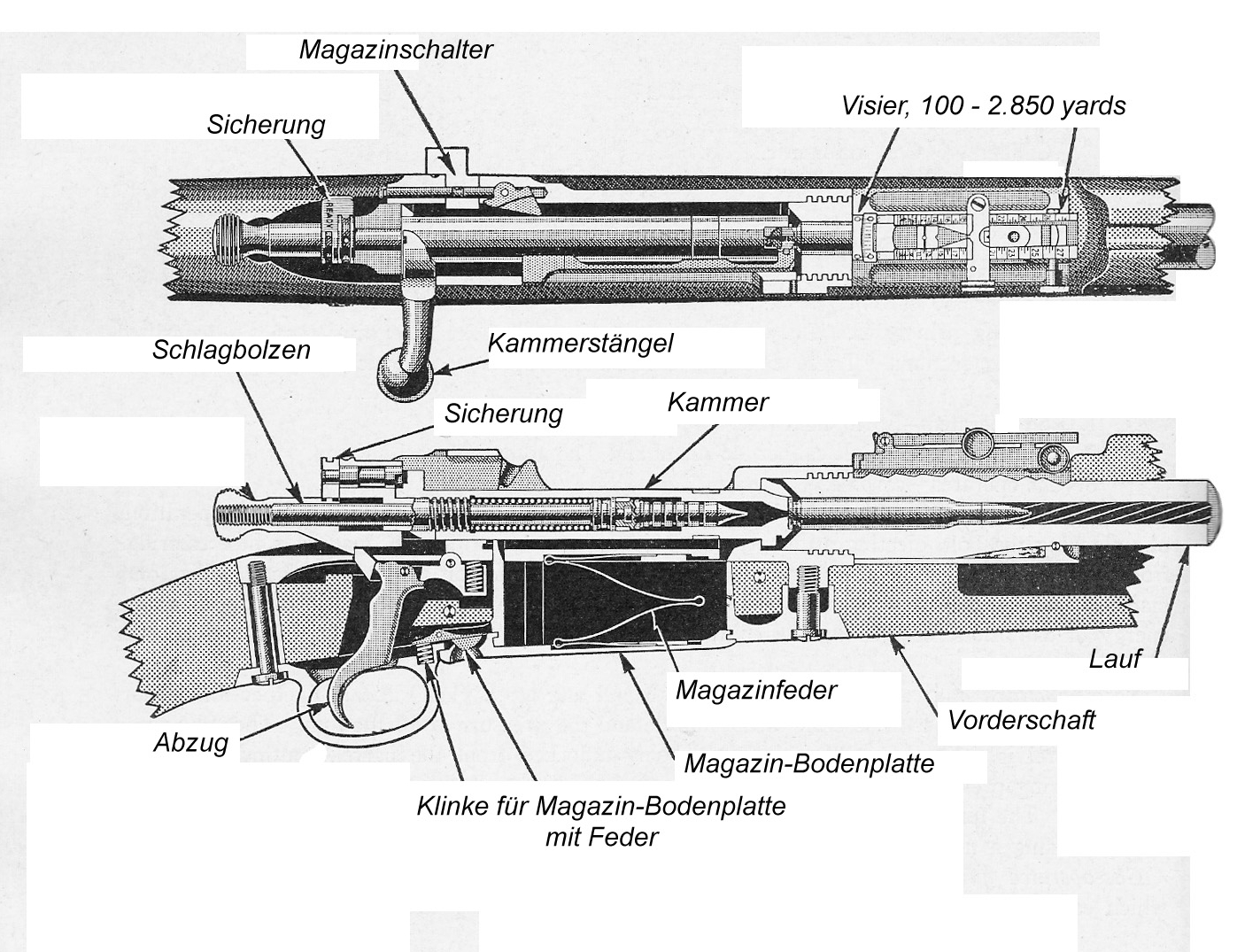 Schnittzeichnung Springfield Mod. 03 caliber .30